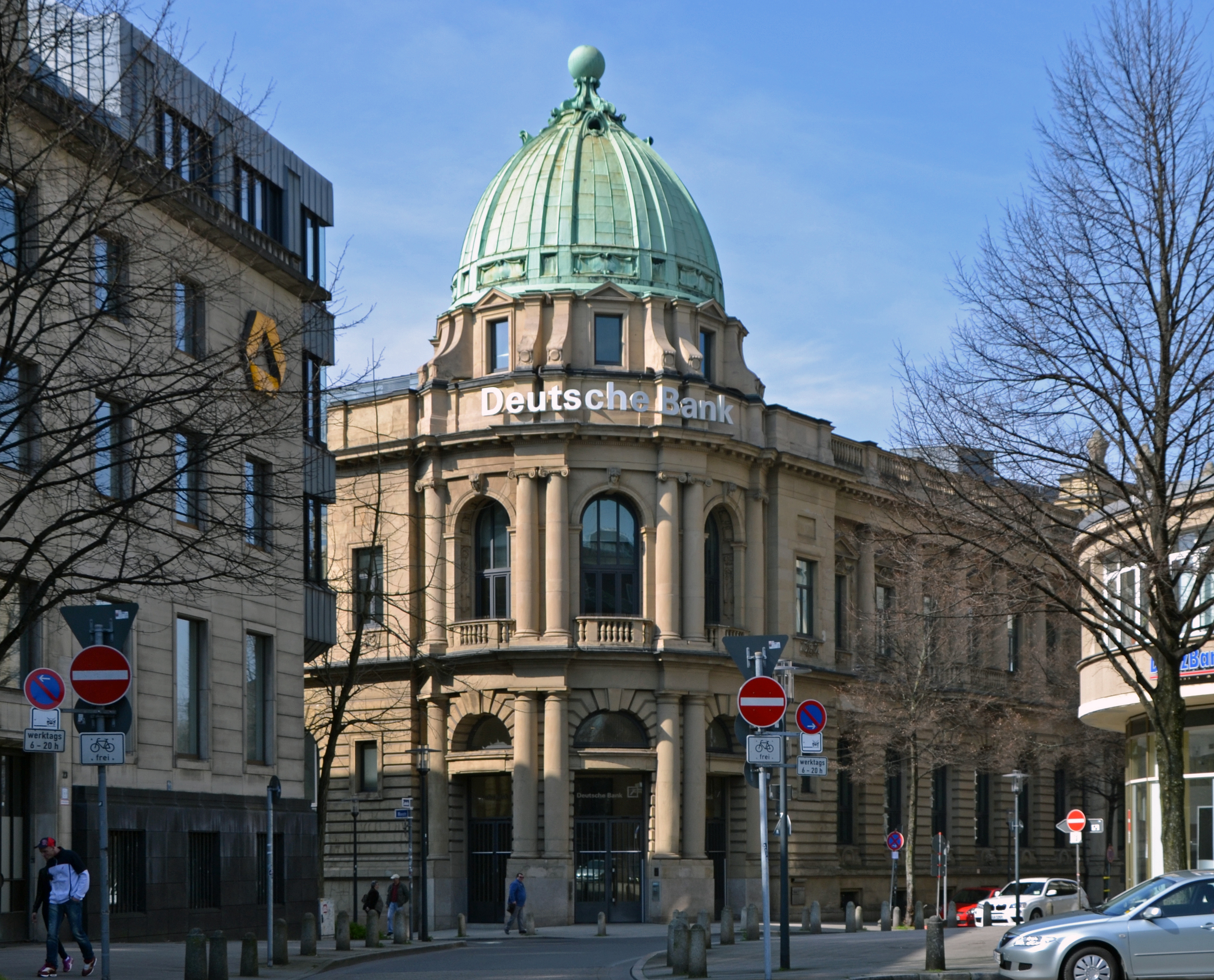 Bankenviertel Essen, Gebäude der ehem. Essener Creditanstalt, heute Deutsche Bank